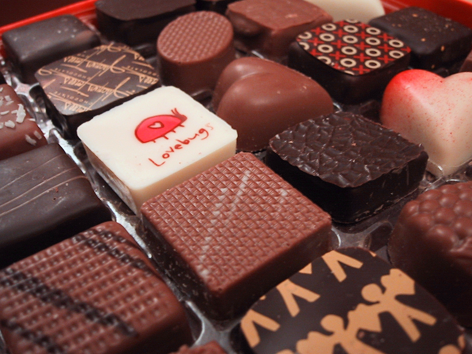 Jacques Torres chocolates...mmmm